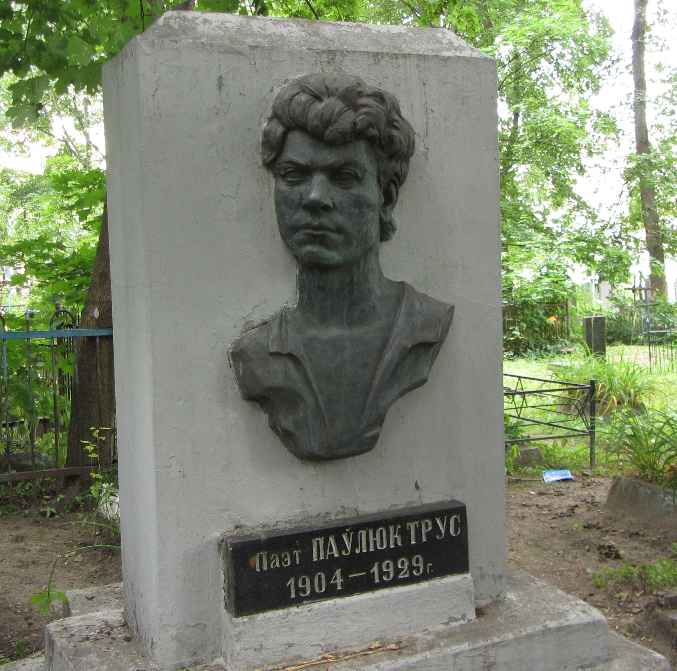 Беларуская (тарашкевіца): Помнік Паўлюку Трусу. Вайсковыя могілкі, Менск